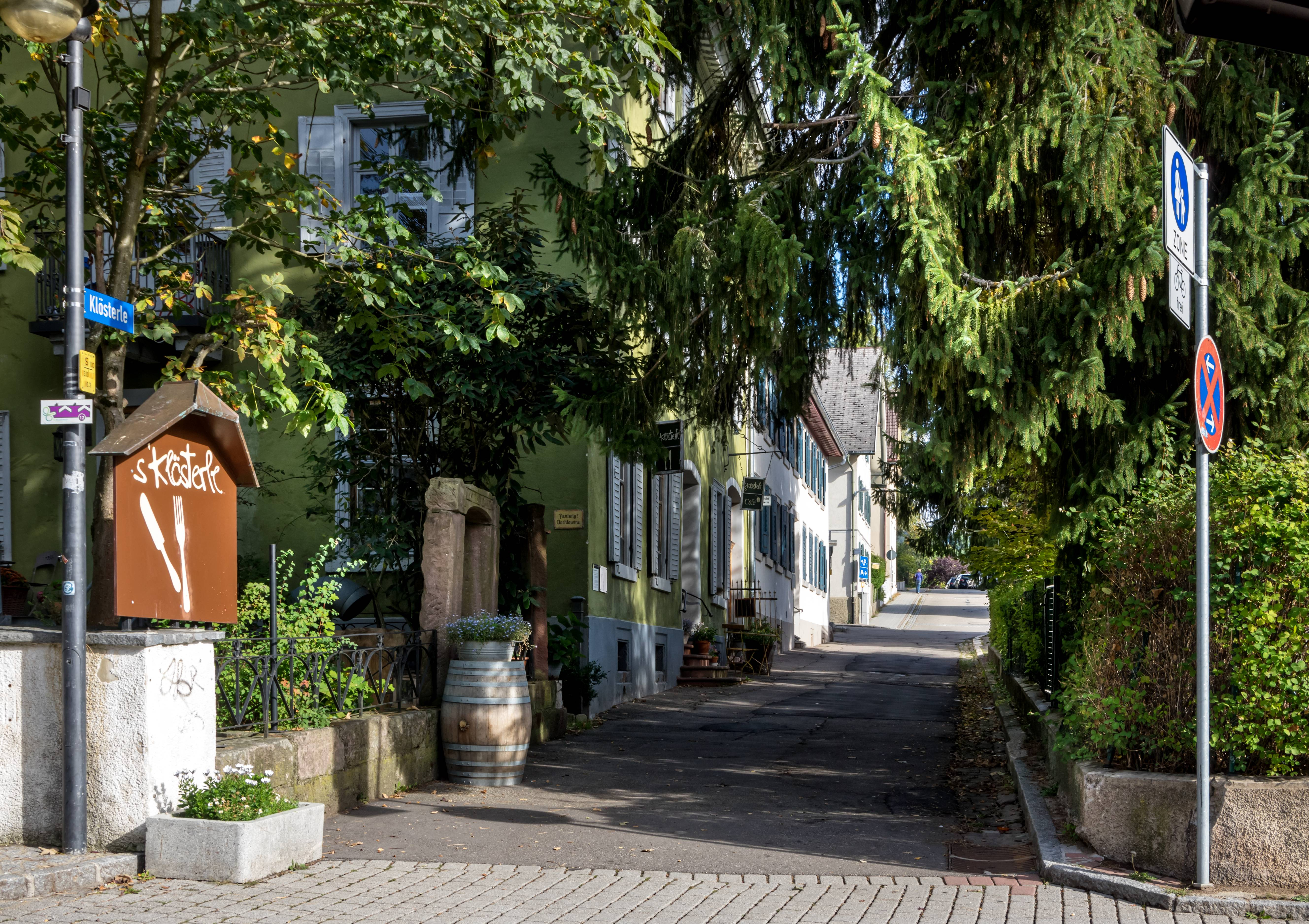 Bilder aus dem Ortsteil Neustadt der Stadt Titisee-Neustadt